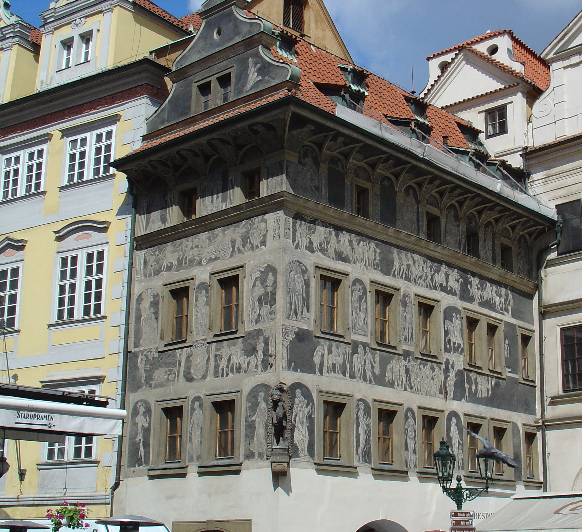 Dům U Minuty